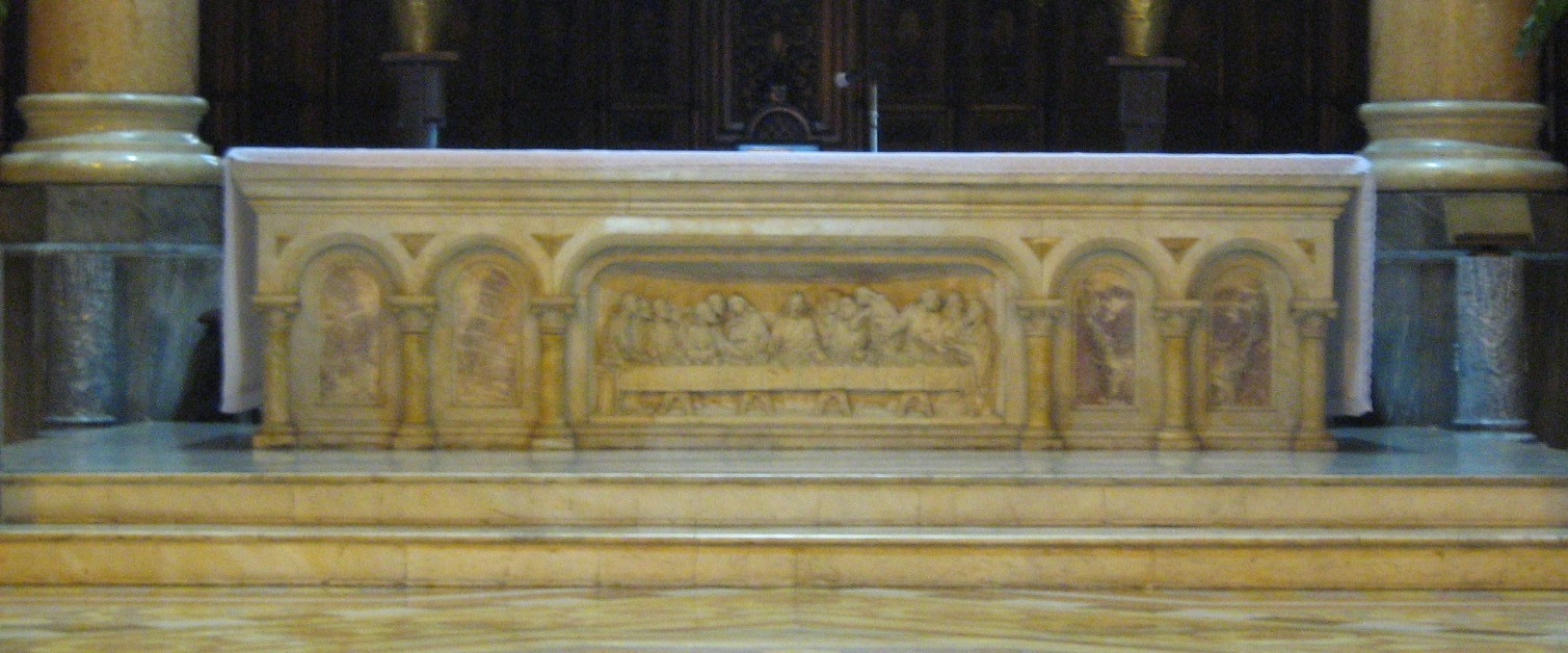 Altar de la Catedral Metropolitana de Medellín. Colombia